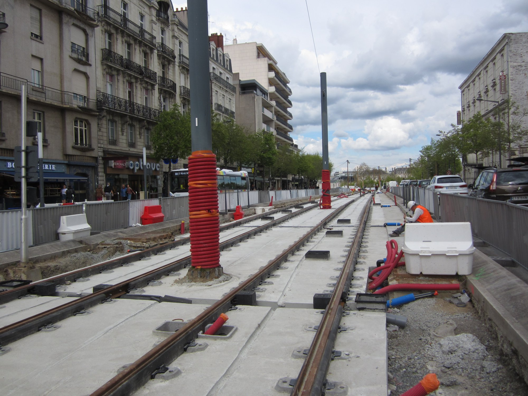 avril 2019 pose de la nouvelle voie boulevard Foch pas très loin de la place lorraine